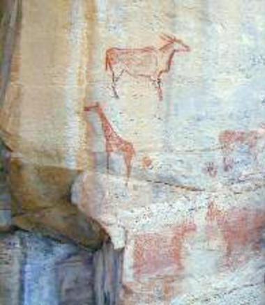 Tsodilo rock paintings, Botswana